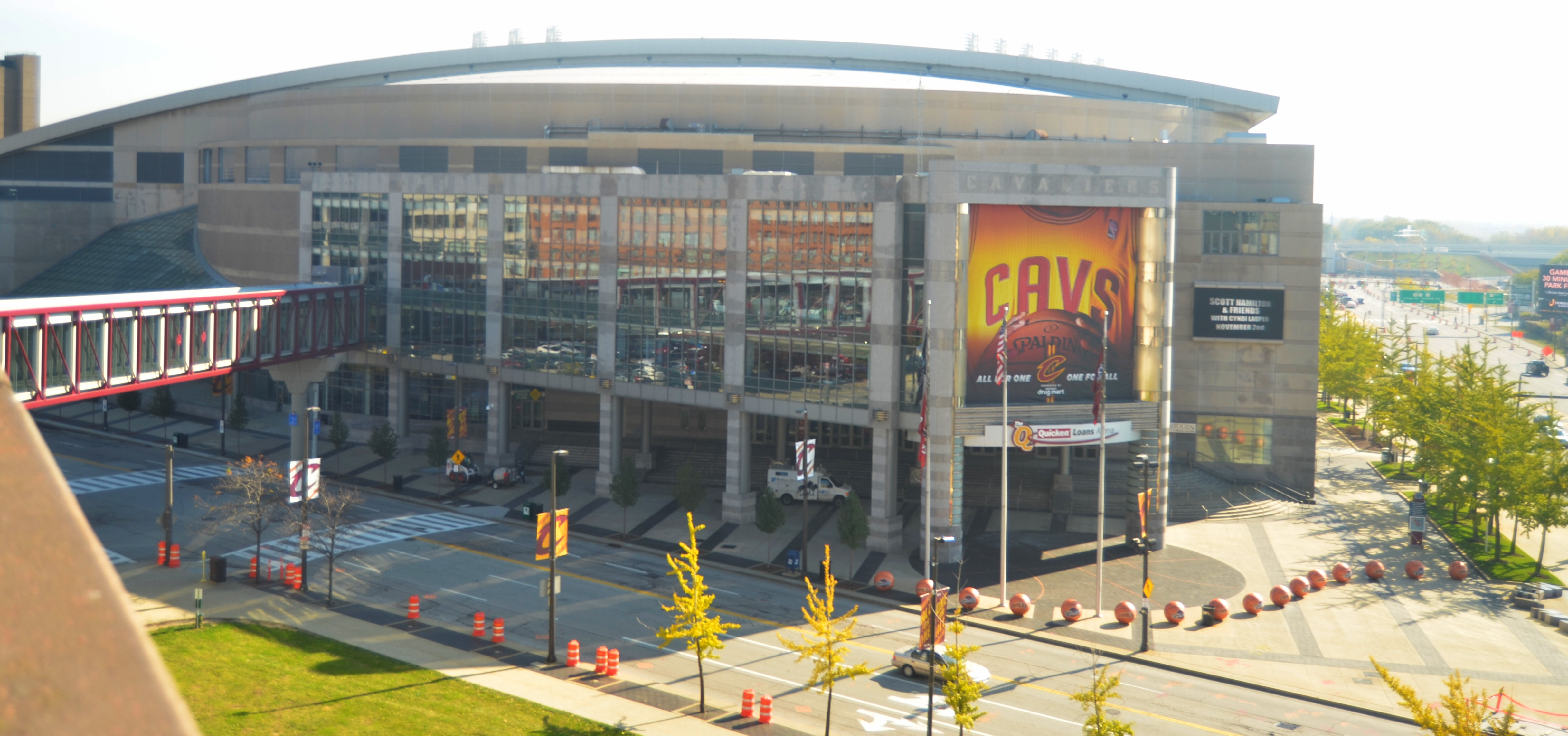 Quicken Loans Arena in 2013